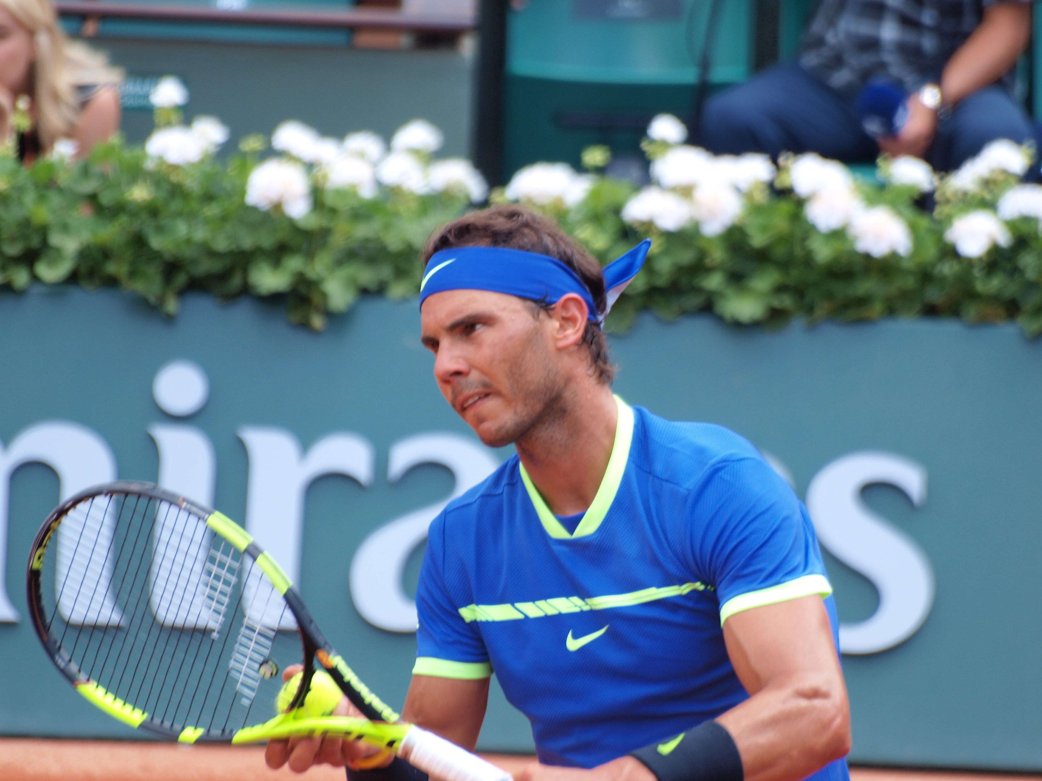 Rafael Nadal lors des Internationaux de France de Tennis au stade Roland Garros de Paris, le 2 juin 2017, durant le match contre Nikoloz Basilashvili.